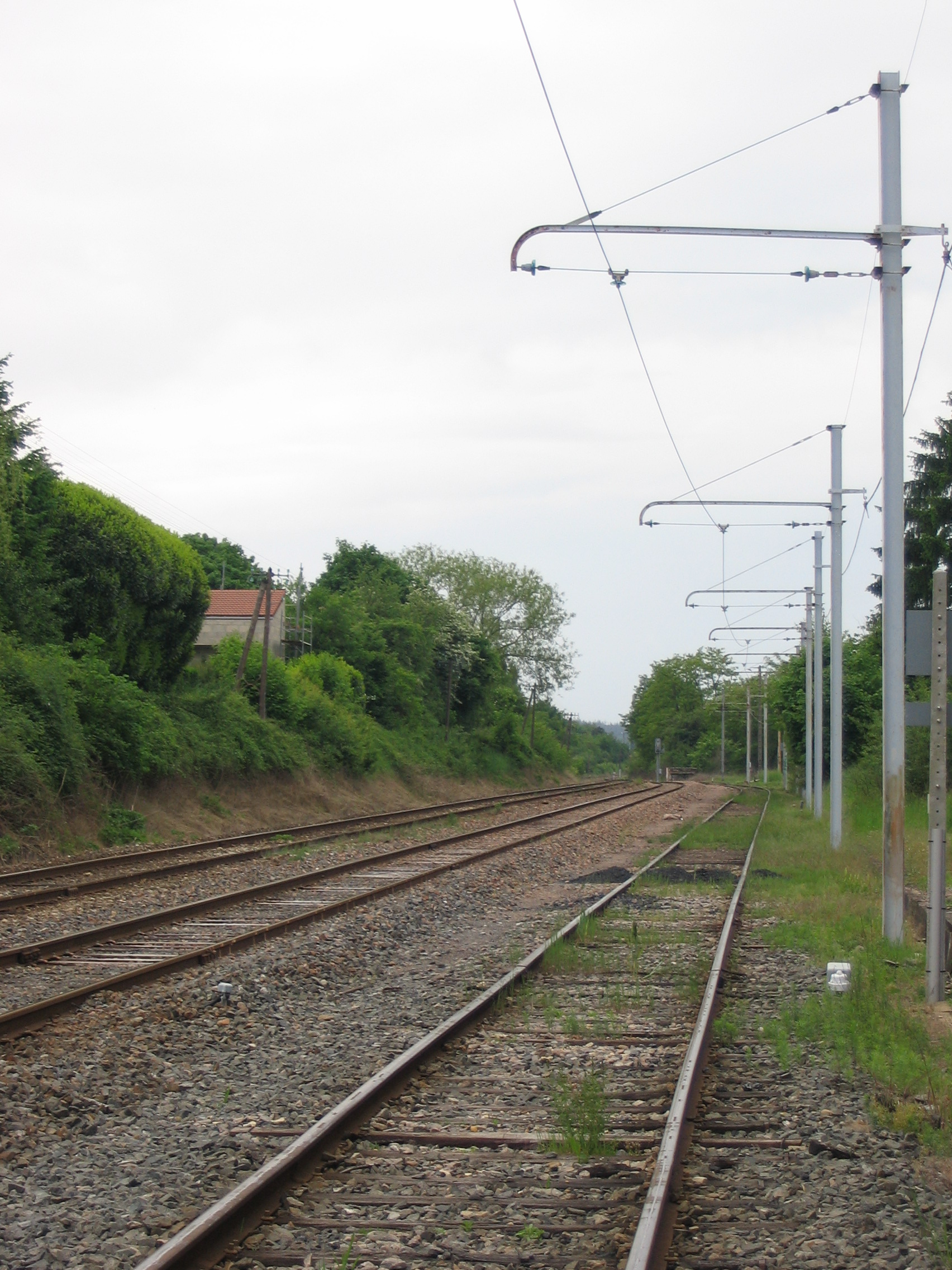 Embranchement ferroviaire vers le lavoir des Chavannes (Montceau-les-Mines, Saône-et-Loire); à gauche, les deux voies de la ligne classique SNCF continuent vers Paray (sud), à droite la voie sous caténaire rejoint l'usine.